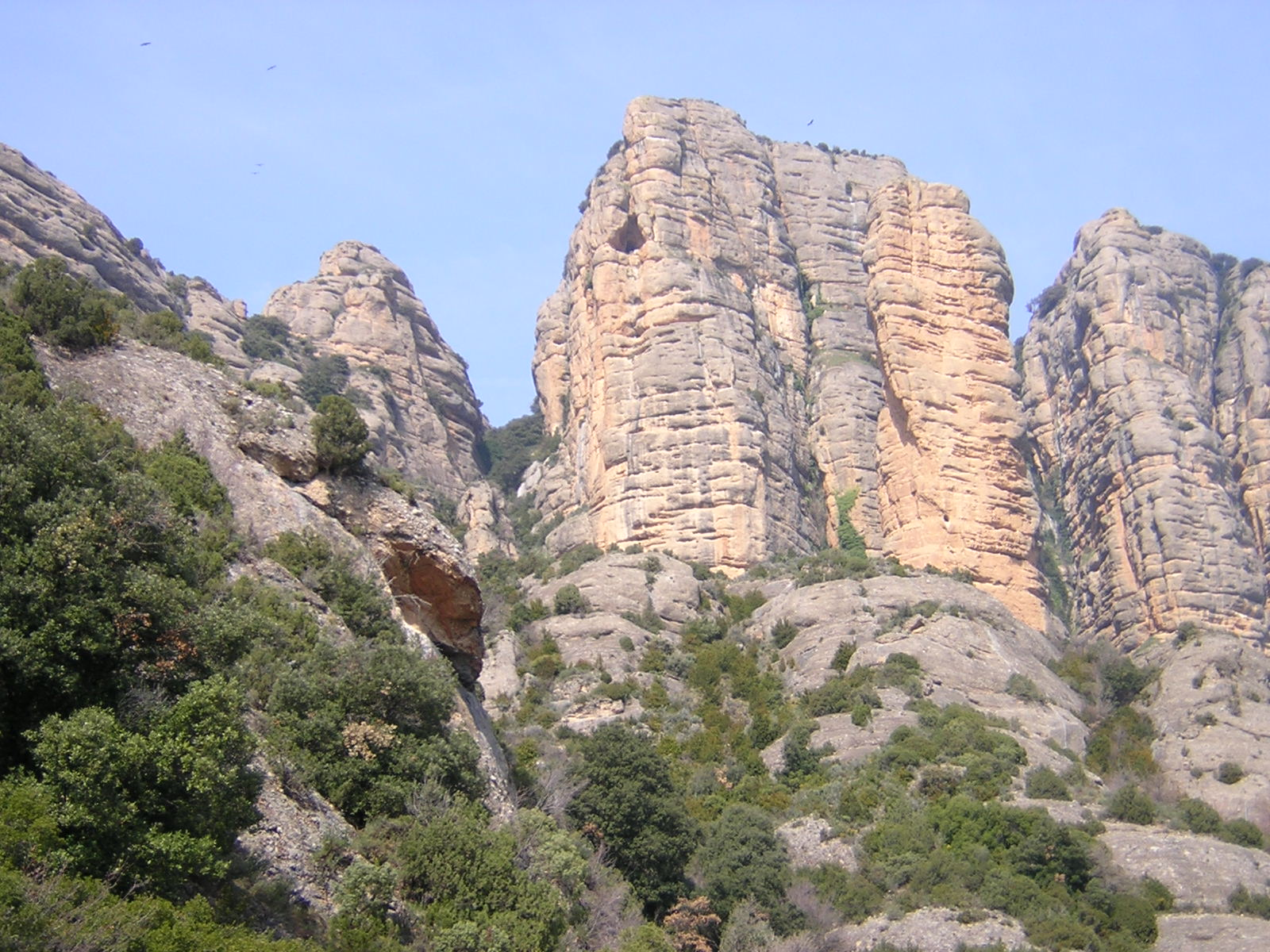 Detalle de los mallos de San Jorge, en las proximidades del embalse de Vadiello (Huesca)